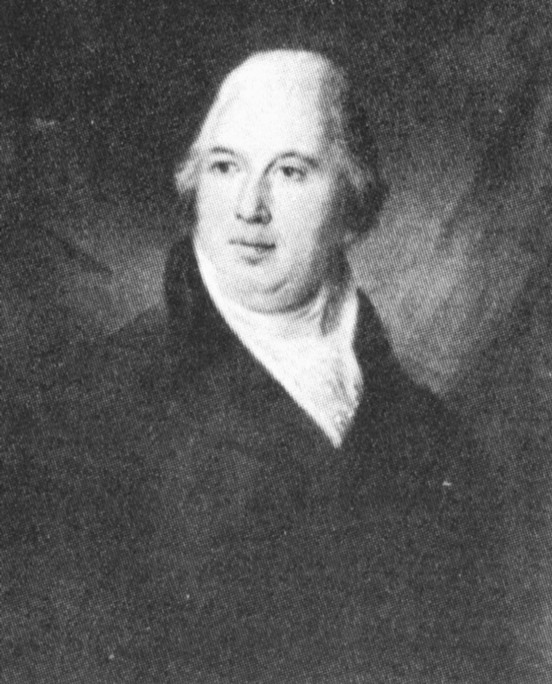 Carl Adolph Grevesmühl ägare av Zinkensdamms gård